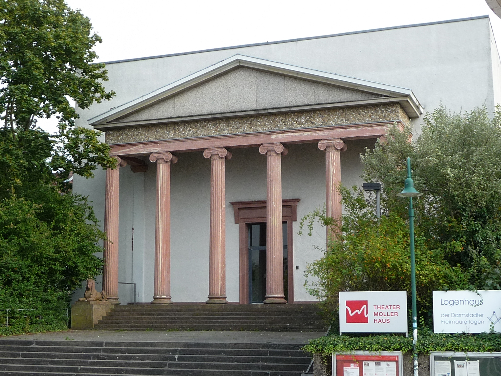 Georg-Büchner-Platz vor dem Staatstheater in Darmstadt